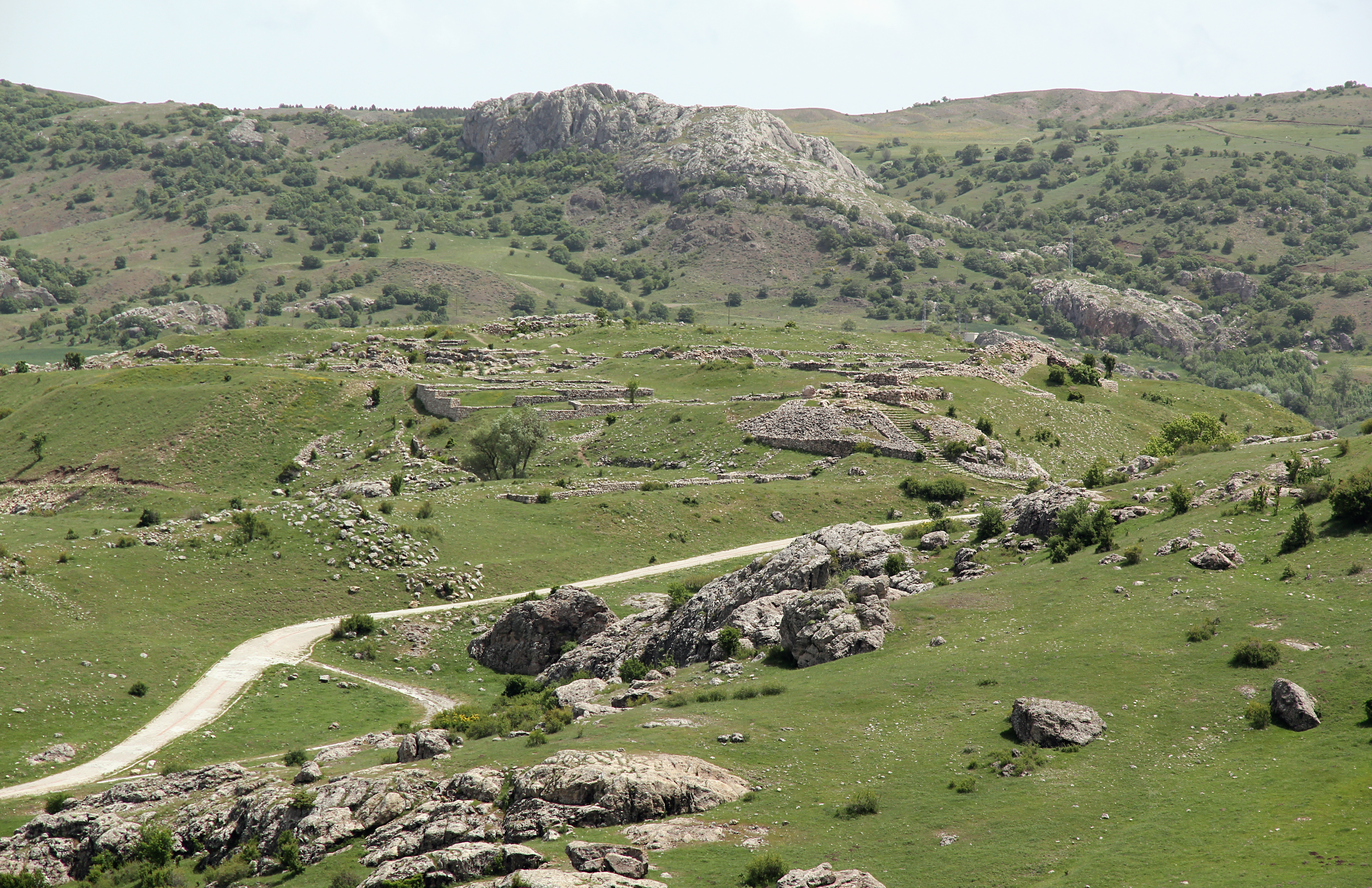 Büyükkale, die Zitadelle der hethitischen Hauptstadt Hattuša bei Boğazkale, Zentraltürkei, Ansicht von Westen, von Kesikkaya